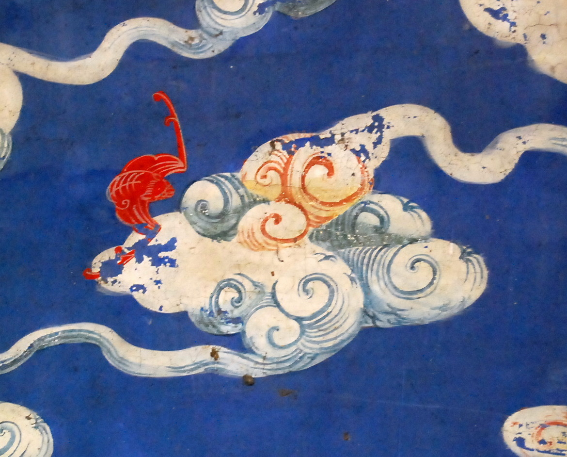 中国传统建筑装饰中的蝙蝠图案